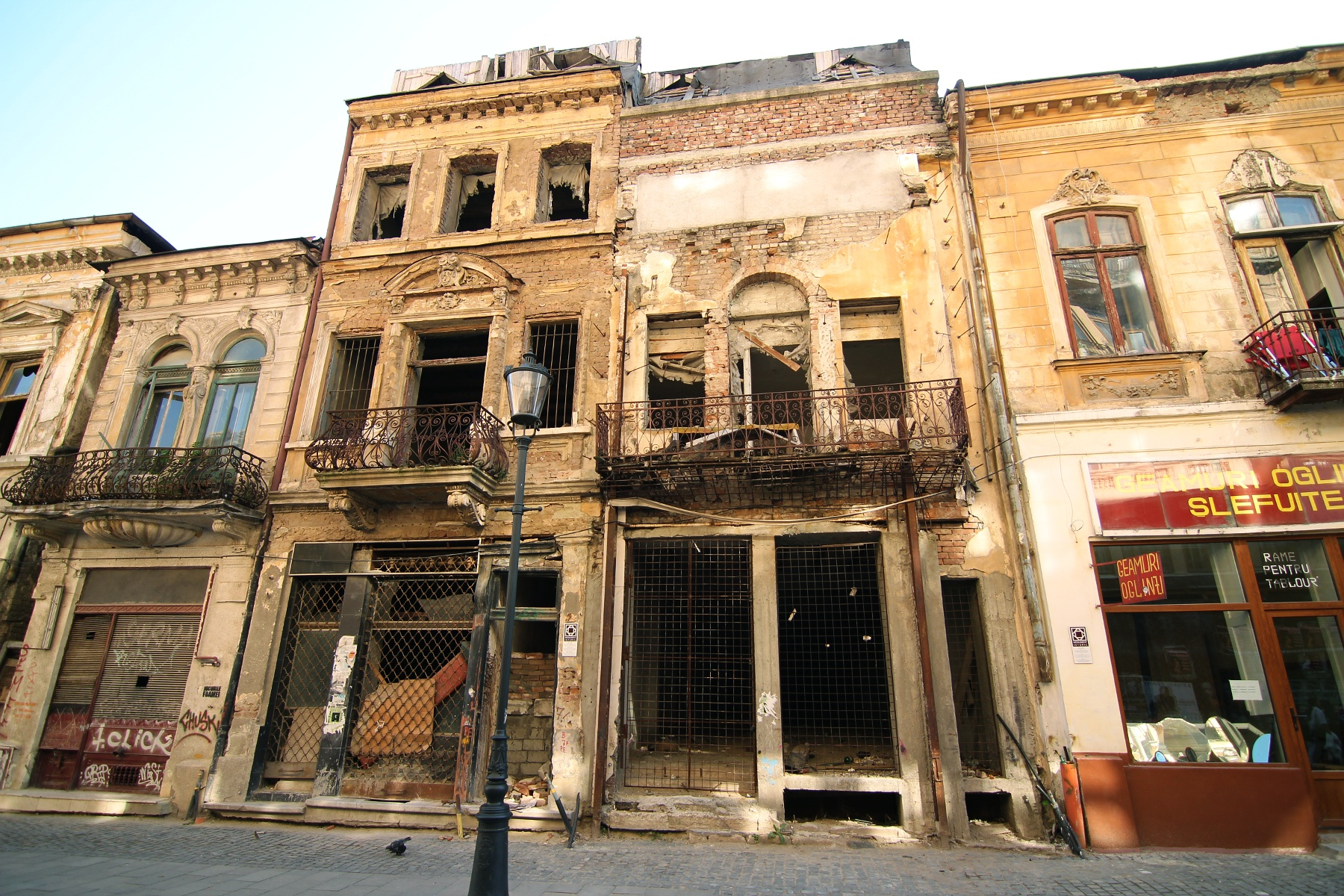 Ansamblul de arhitectură "Strada Franceză"